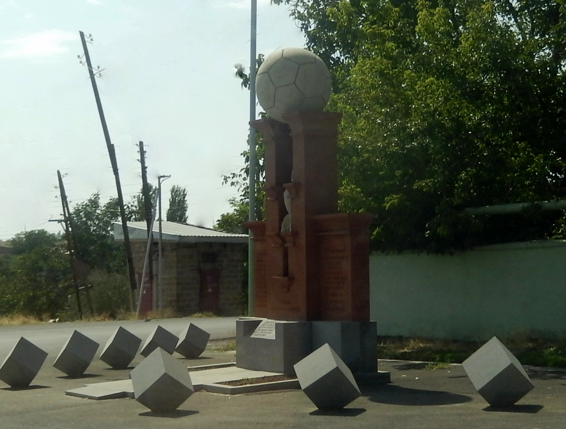 «Արարատ-73»-ի 40-ամյակի հուշարձան (Ագարակ)